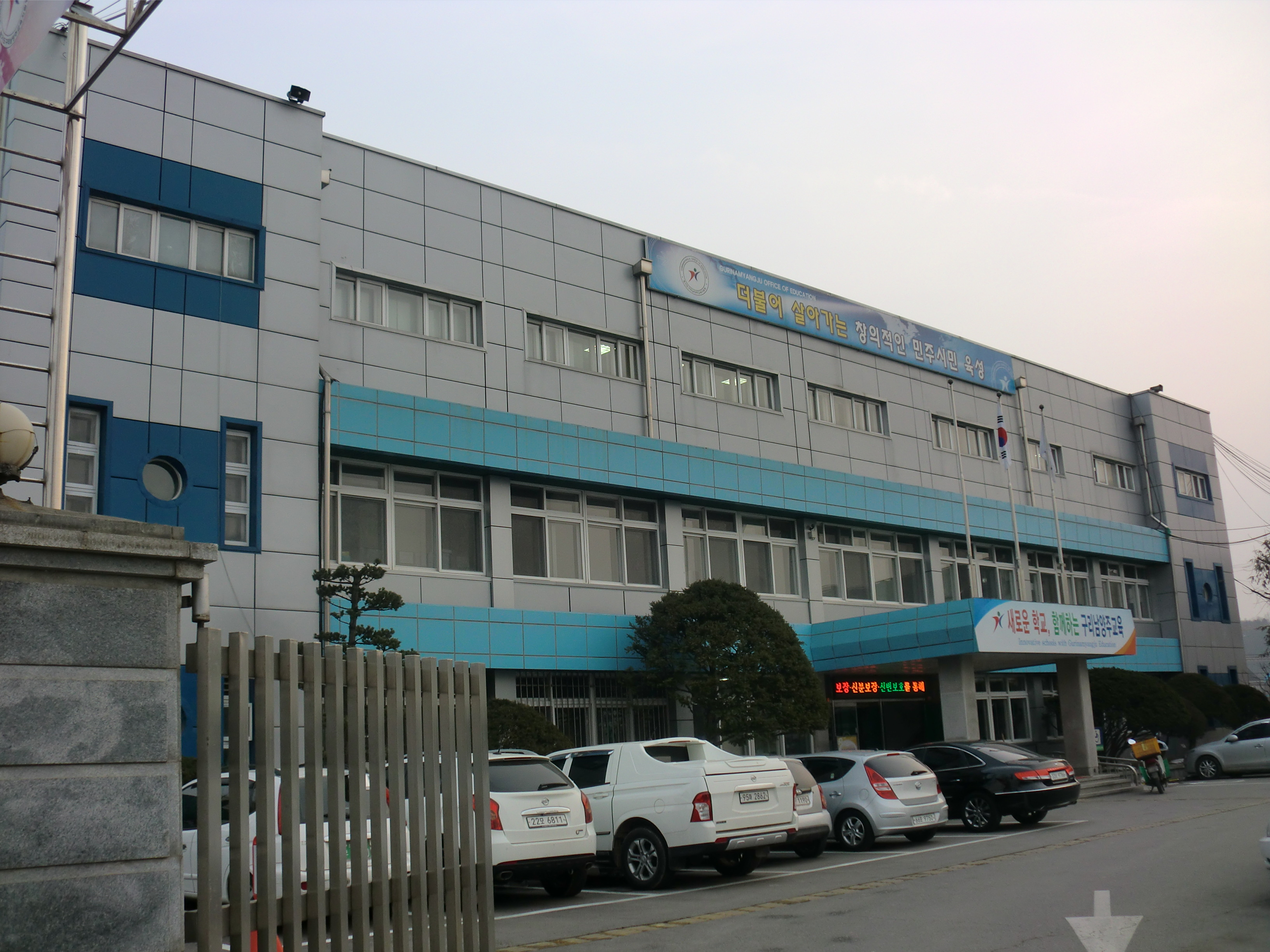 경기도 남양주시에 있는 경기도구리남양주교육지원청